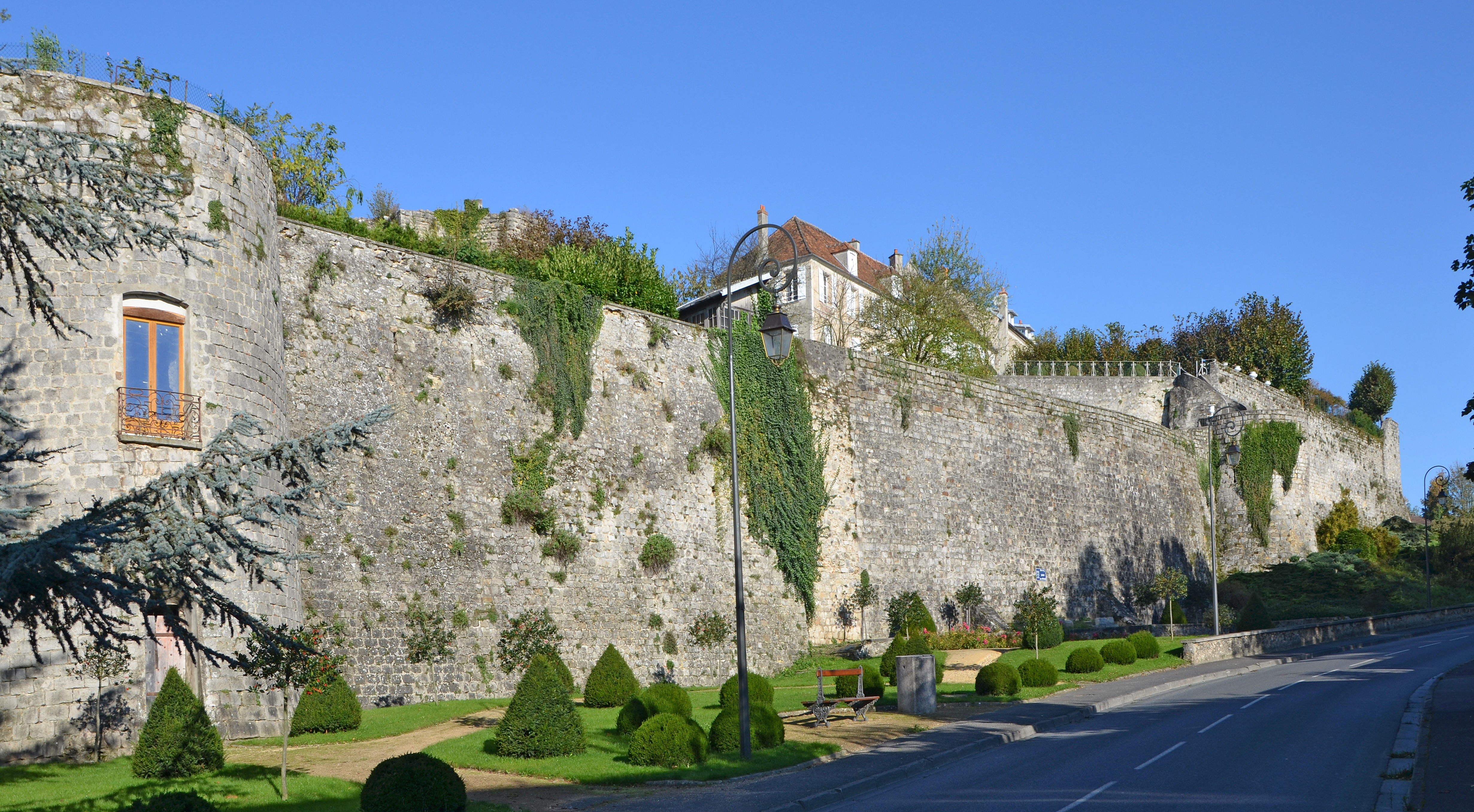 Remparts- de Chateau-Thierry, Aisne, Picardie, France